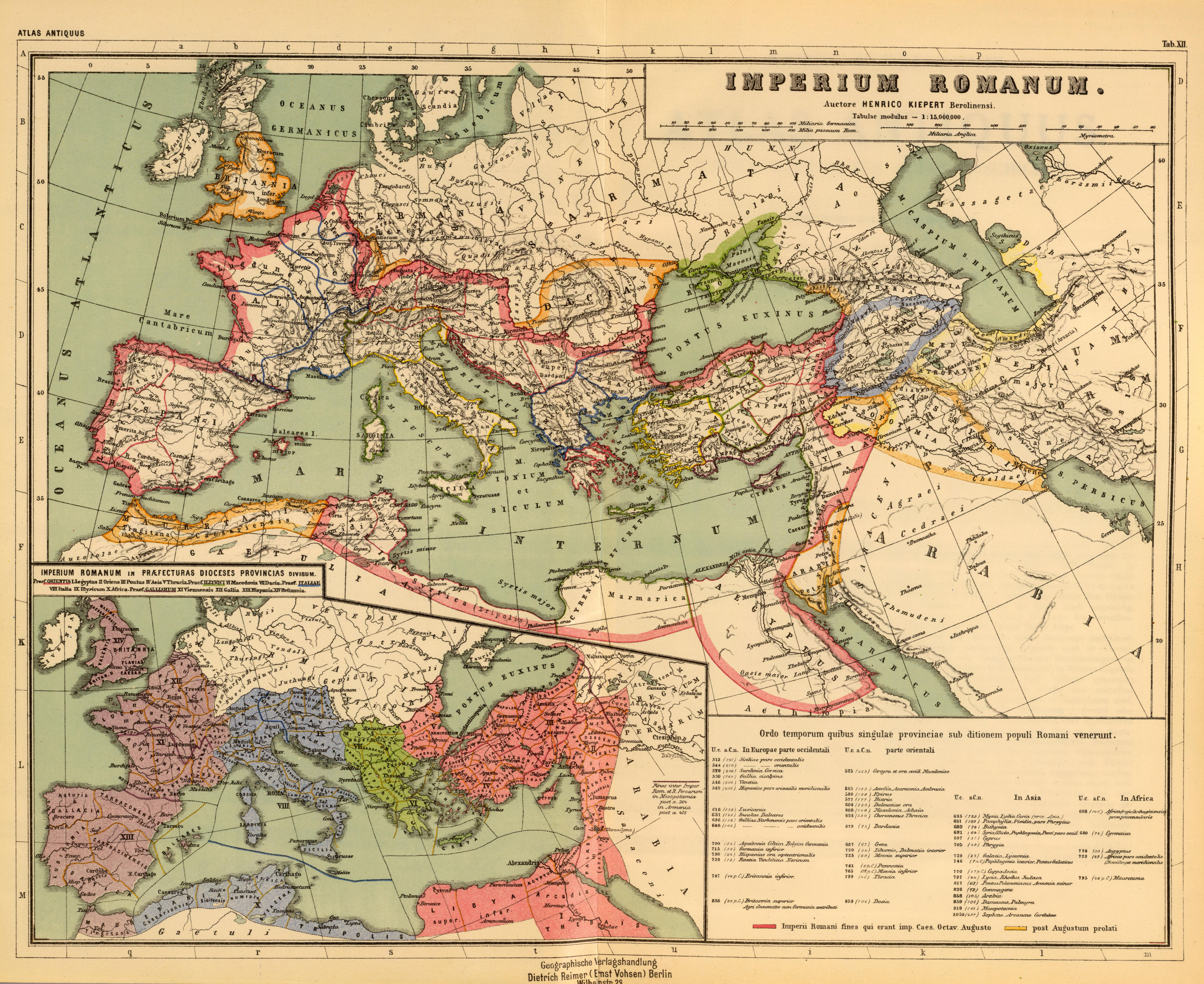 Imperium Romanum. (with) Imperium Romanum in praefecturas, dioceses, provincias divisum. Auctore Henrico Kiepert Berolinensi. Geographische Verlagshandlung Dietrich Reimer (Ernst Vohsen) Berlin, Wilhemlstr. 29. (1903)